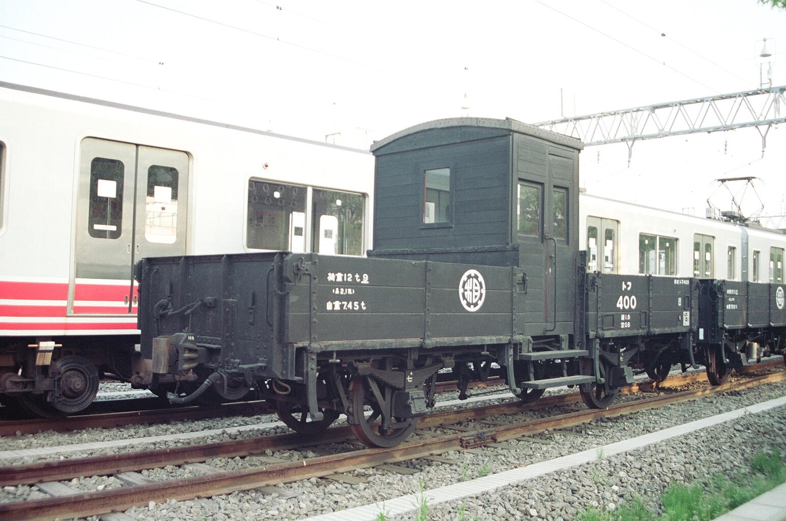 相模鉄道トフ400、厚木駅にて撮影